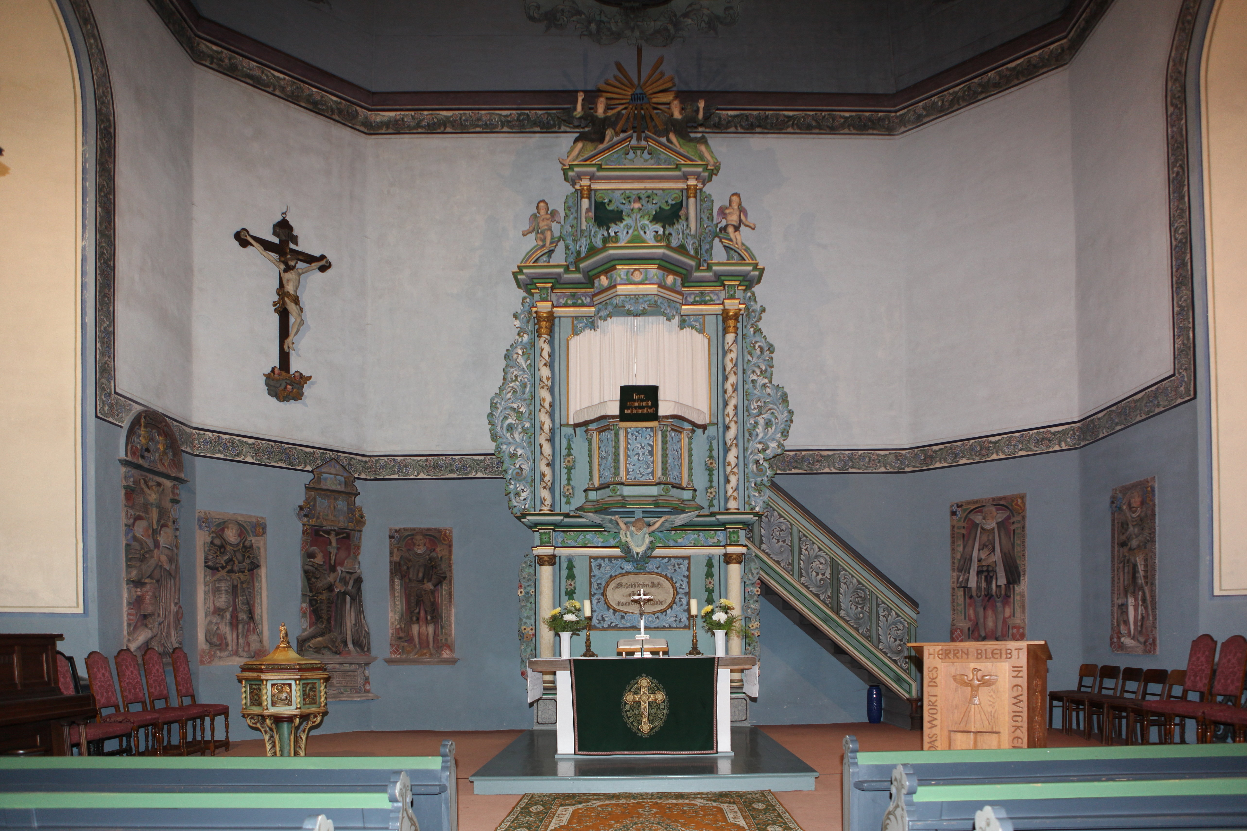 Altarraum St. Marien in Gräfenthal